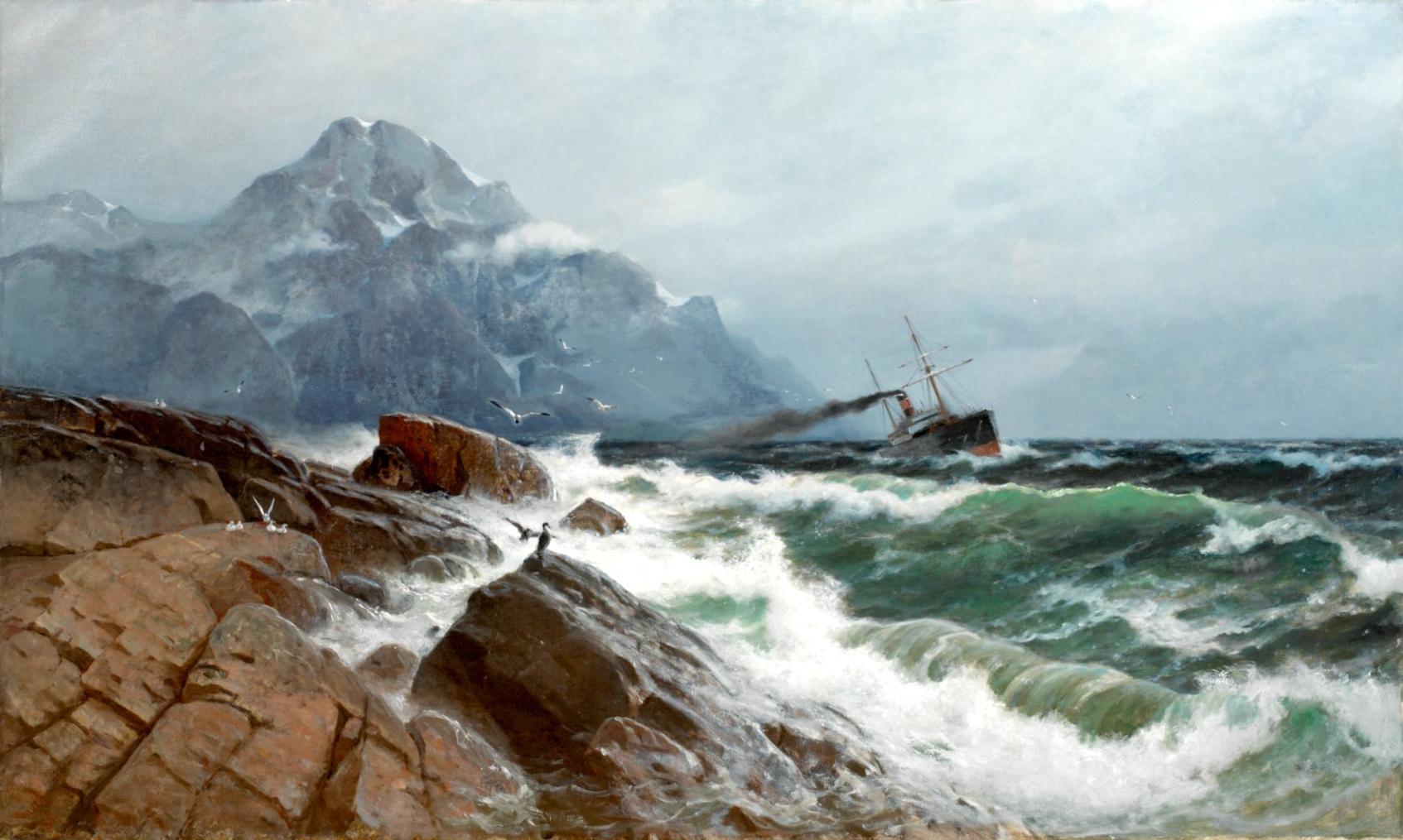 Marine